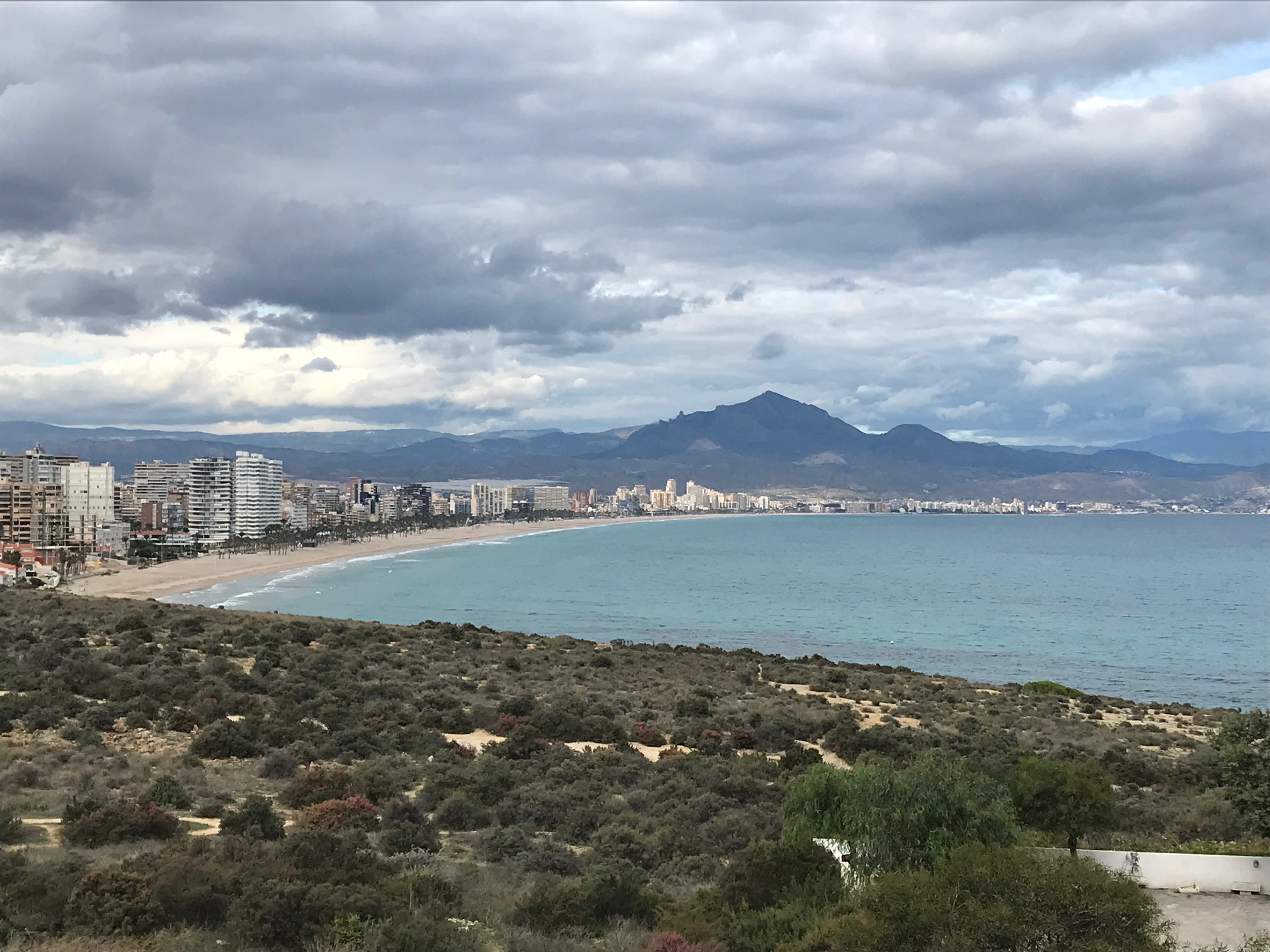 vue de San Juan du Cabo Huertas